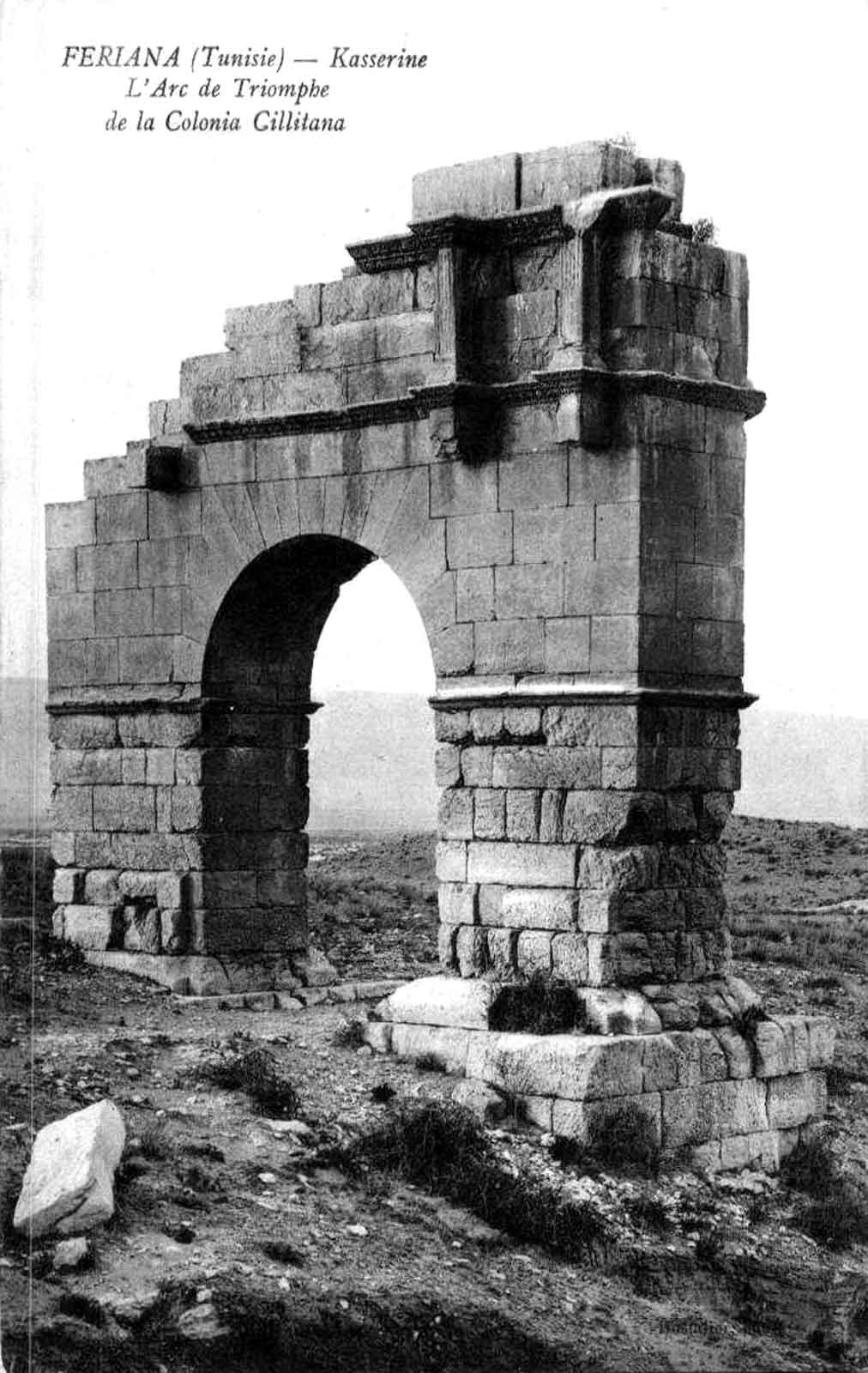 Arc de triomphe de la Colonia Cillilana à Kasserine (et non pas Fériana comme indiqué)